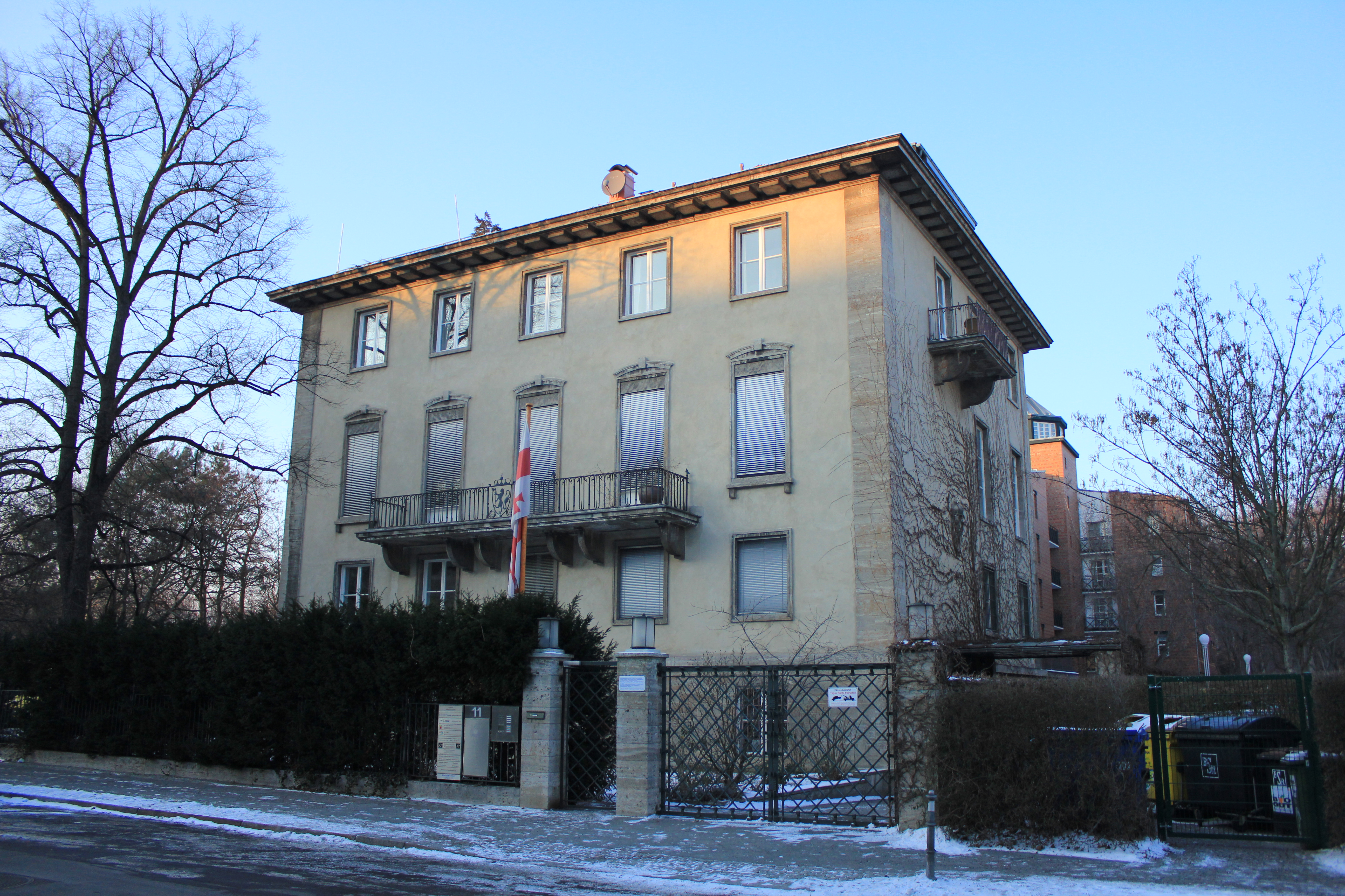 Norwegische Gesandtschaft 1940-41 von Otto v. Estorff und Gerhard Winkler. Seit 1992 Sitz der Botschaft von Georgien.